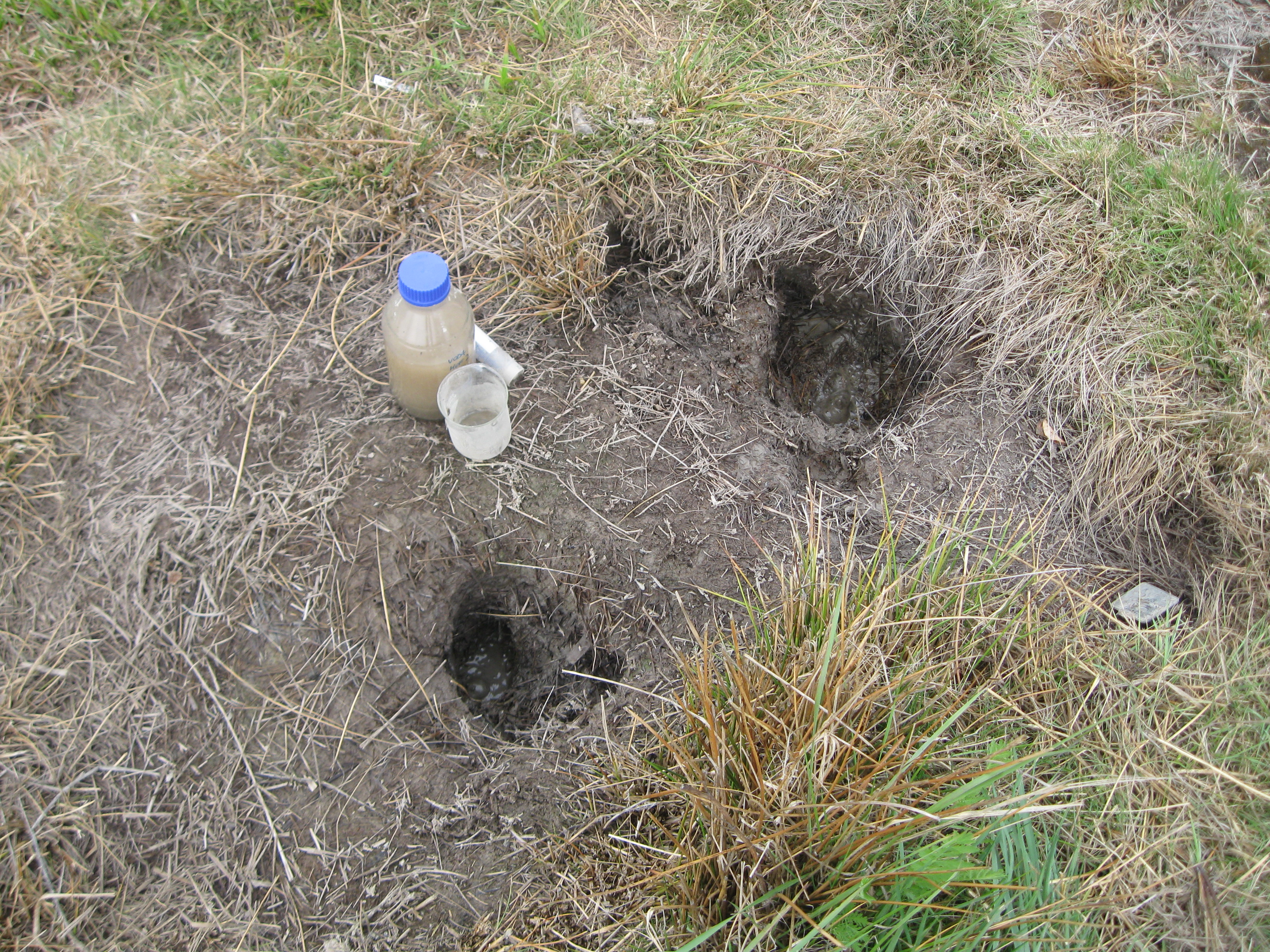 Mofete med naseljema Stavešinci in Ivanjševci ob Ščavnici na obeh straneh ceste.